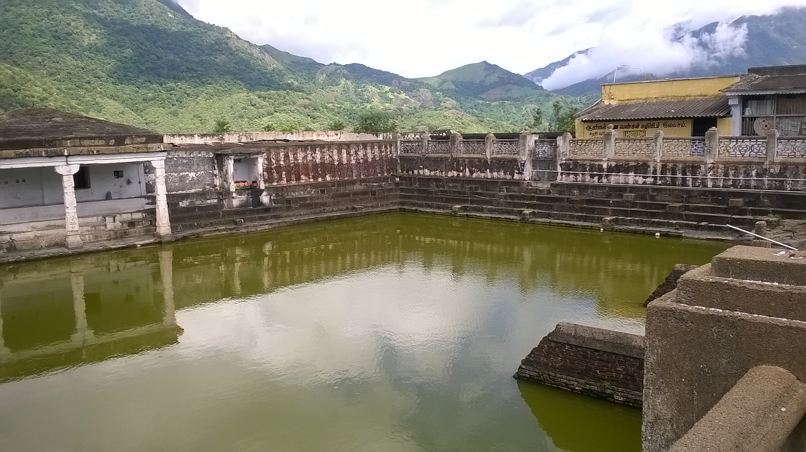 கட்டுரைக்கு